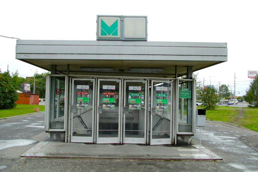 Yekaterinburg Metro (Екатеринбургский метрополитен)